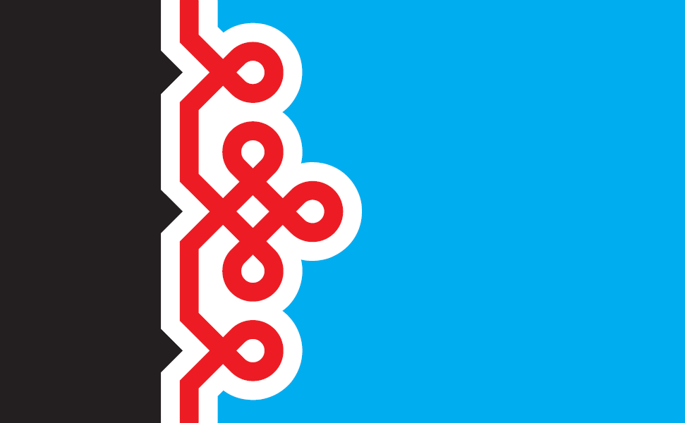 Mulgimaa lipp